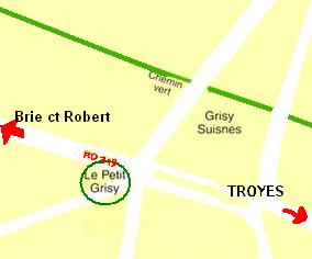 Je suis createur de l'image, 77bcr77